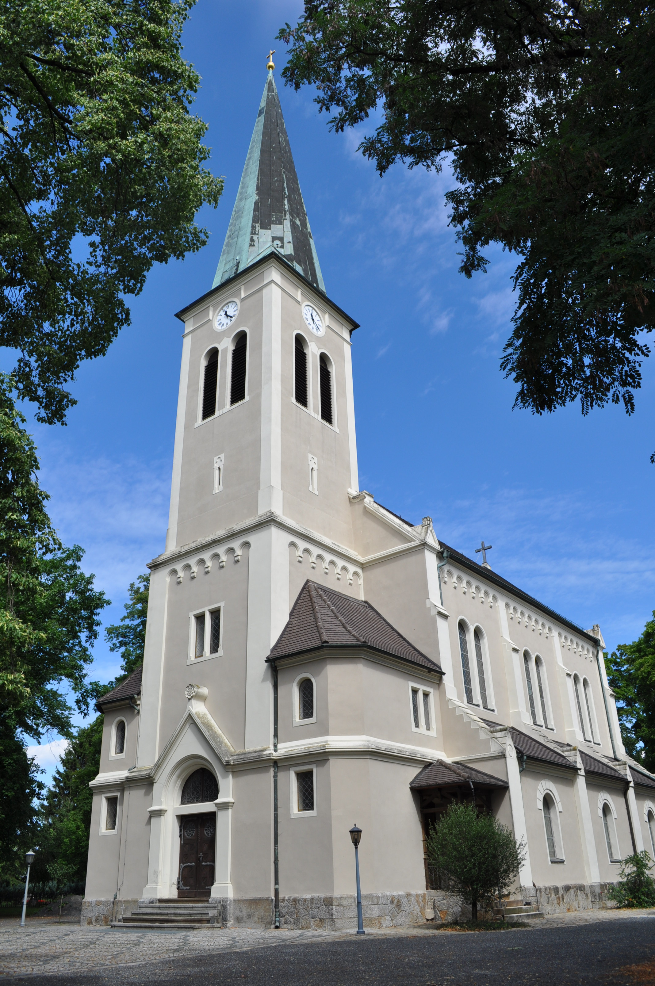 Quatitz Kirche